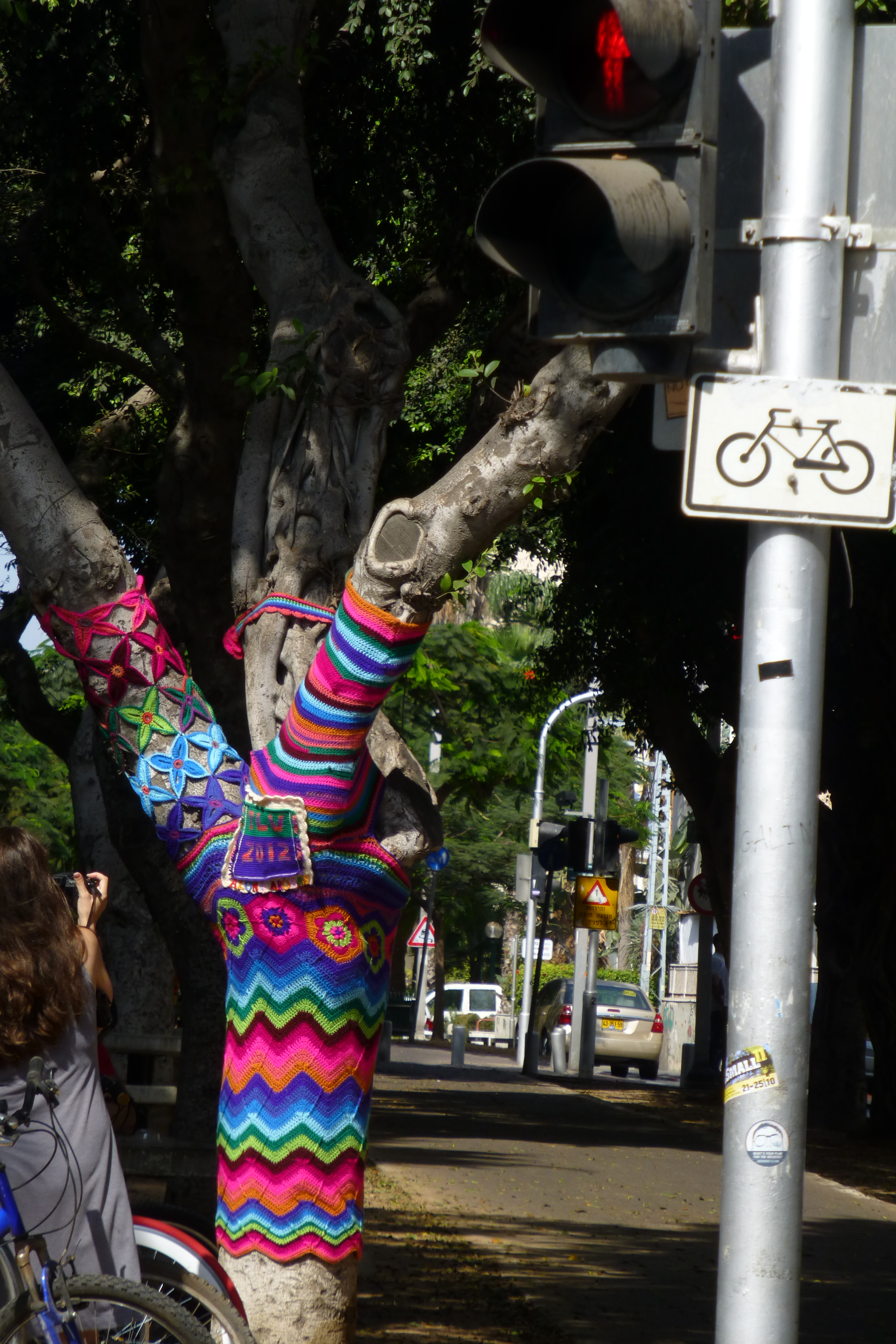 שדרות רוטשילד היו בין ארבעת הרחובות הראשונים של תל אביב (שנקראה אז "אחוזת בית"), שנחנכו לאחר רחוב הרצל (הרחוב הראשון בעיר), ובניצב אליו. הרחובות נסללו על גבי דיונות חול אשר יושרו ושוטחו, ולאורכם נבנו בתיה הראשונים של העיר. התוואי שהפך להיות השדרה היה ואדי קטן שאותו קשה היה ליישר באמצעים של אז, ואליו גם התנקזו מים רבים בחורף. בשל כך הוחלט למלאו בחול להשאירו כשטח פתוח שעליו לא ייבנו בתים אלא בצדיו, כרחוב עירוני רחב יותר. בט"ו בשבט ה'תר"ע (1910) החלו נטיעות בשטח פתוח זה, במטרה להפוך את הרחוב לשדרה הראשונה של העיר. חודשים אחדים לאחר מכן, בדצמבר 1910, החליט ועד אחוזת בית לקרוא לשדרה על שם הברון רוטשילד, ולמנות את מרדכי בן הלל הכהן ואת מאיר דיזנגוף להודיע על כך באופן רשמי לברון. אנשי אחוזת בית ראו בשדרה את תחילתה של שדרה מפוארת כדוגמת הבולווארים המפוארים של פריז.